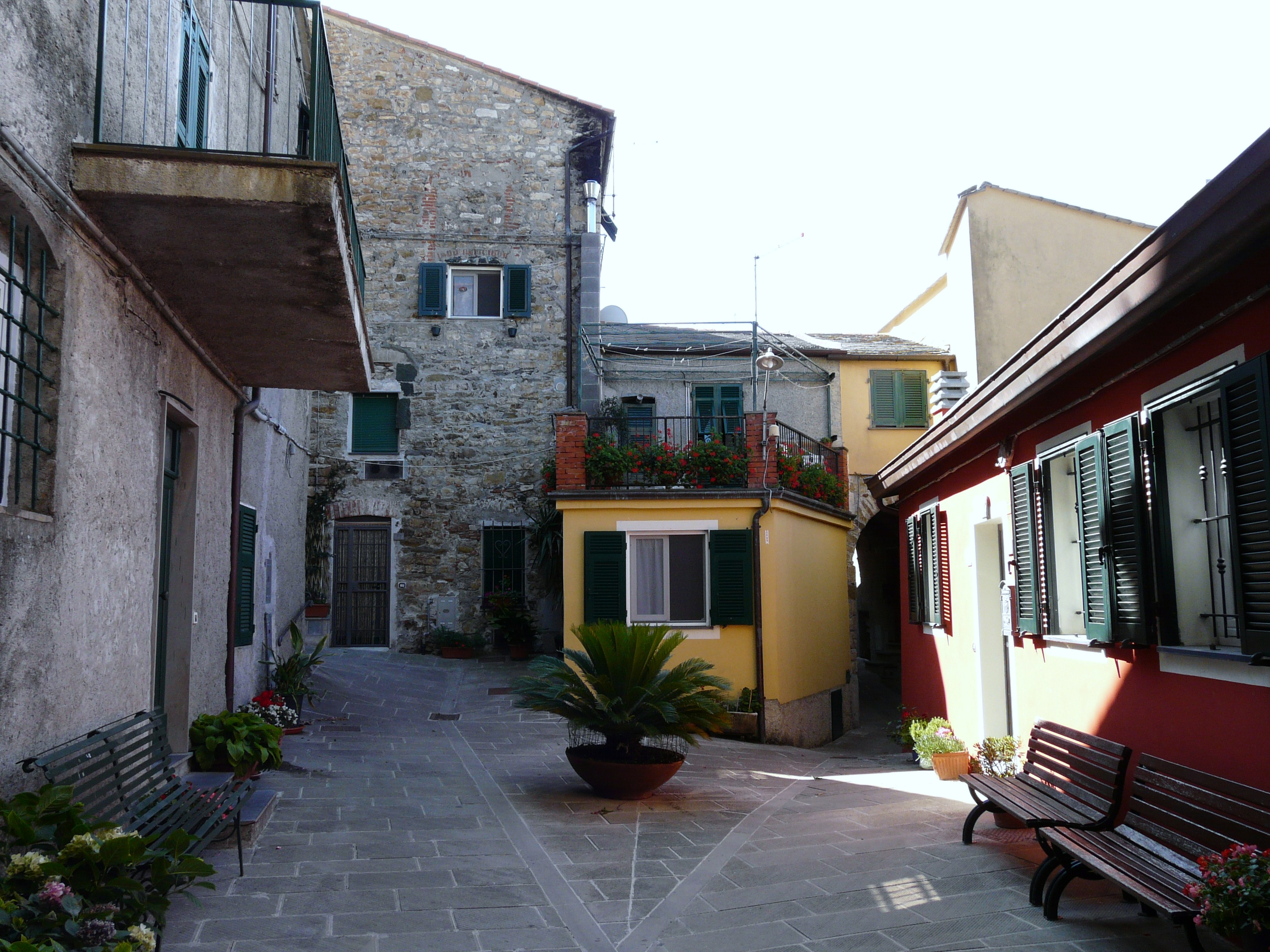 Centro storico, Montaretto, Bonassola, Liguria, Italia